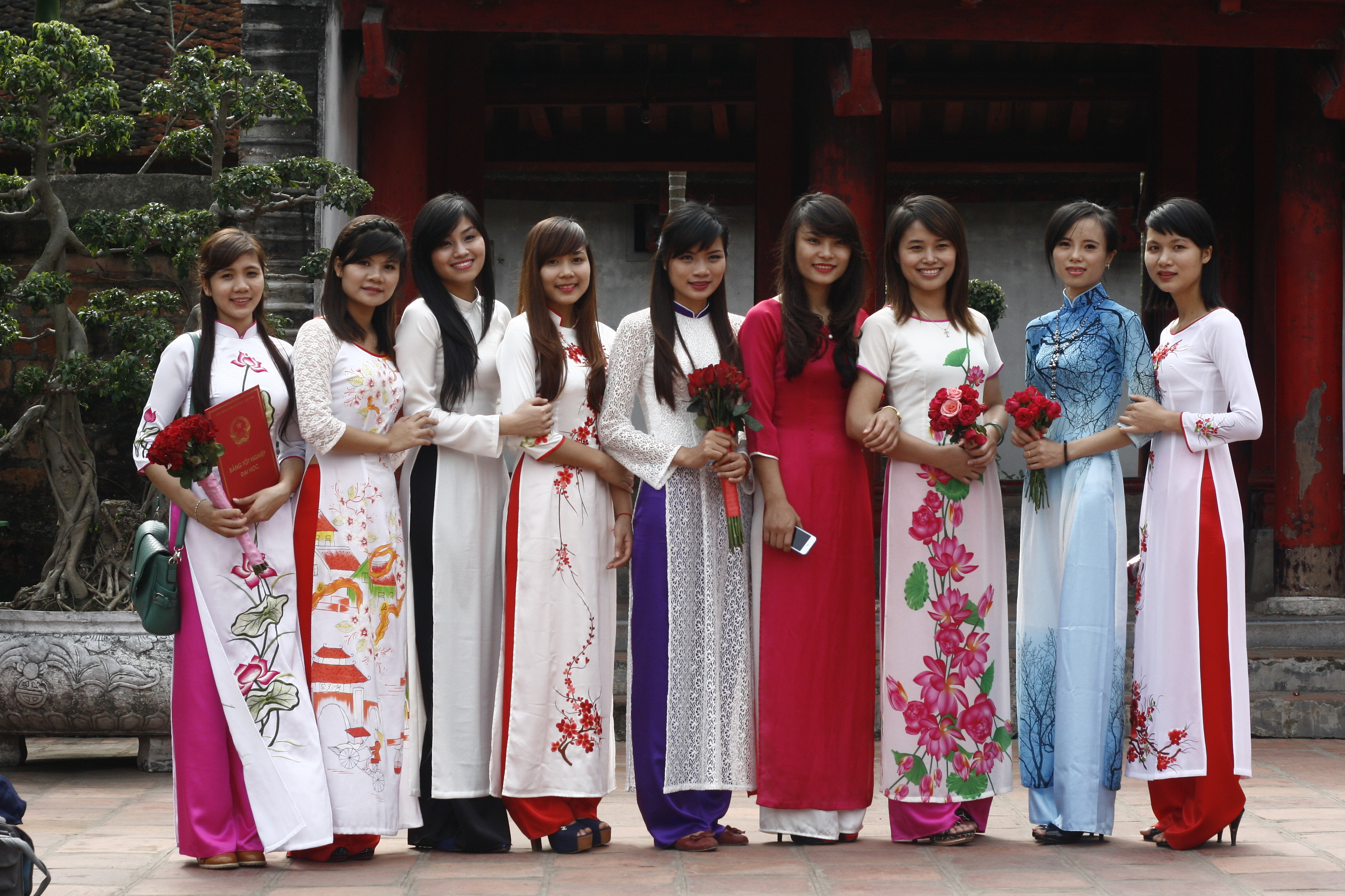 Nữ sinh khoa Văn hóa Du lịch, Đại học Văn hóa Hà Nội với tà áo dài truyền thống trong buổi chụp ảnh kỷ yếu tại Văn Miếu-Quốc Tử Giám